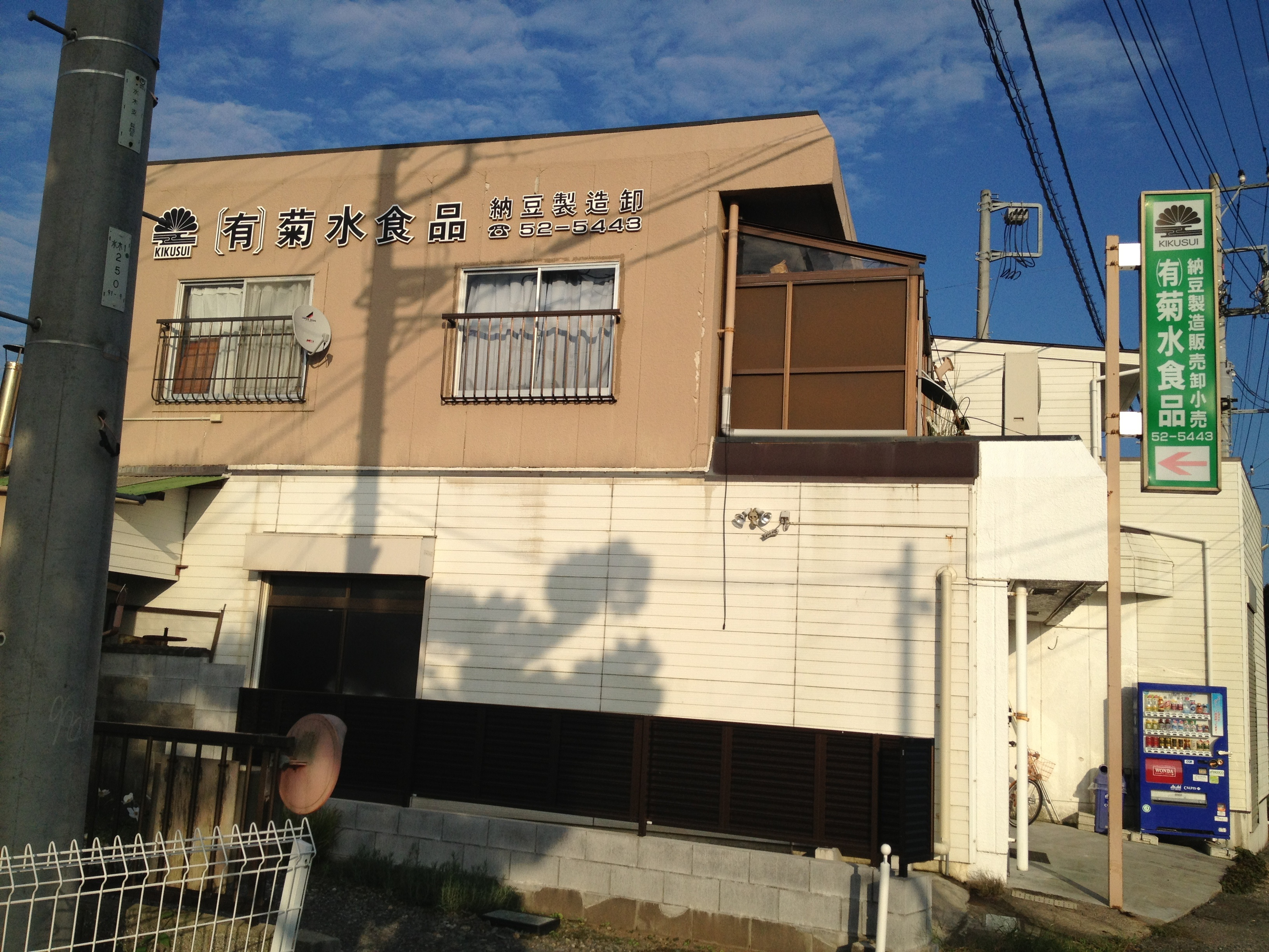 国道側からの近写